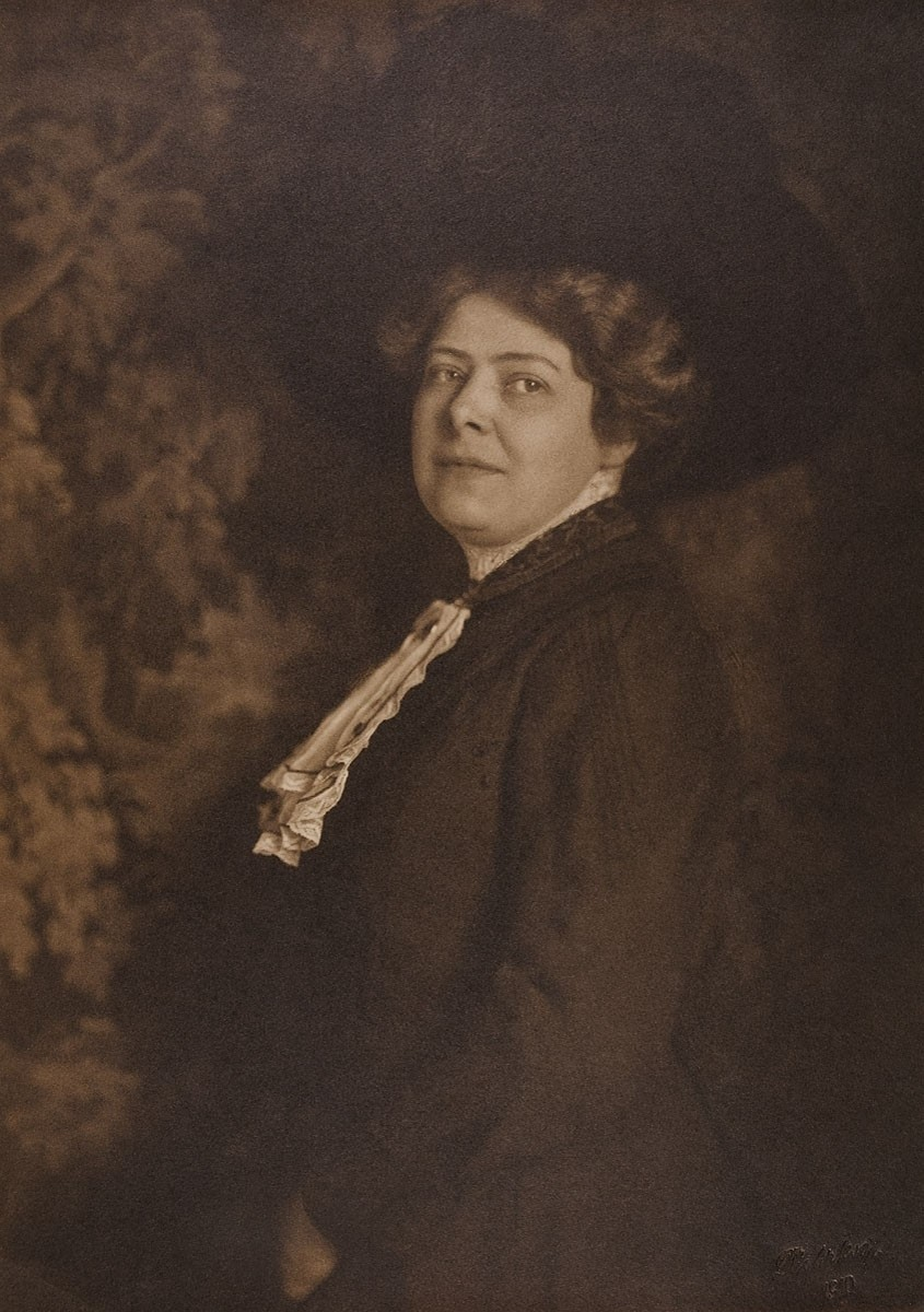 Minya Diez-Dührkoop (1873–1929), deutsche Fotografin